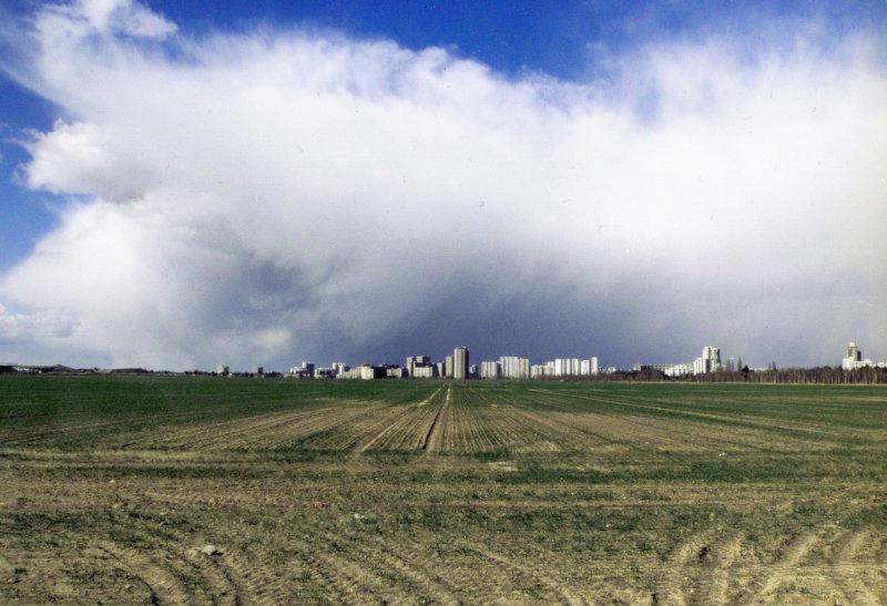 Aufnahme zeigt die Gropiusstadt/Berlin von Süden (Brandenburg). Photographie erstellt 11/2002 von Benutzer:Sansculotte. Bild ist unter der GNU FDL zur weiteren Verwendung freigegeben. Quellenangabe und Beleg an erbeten.